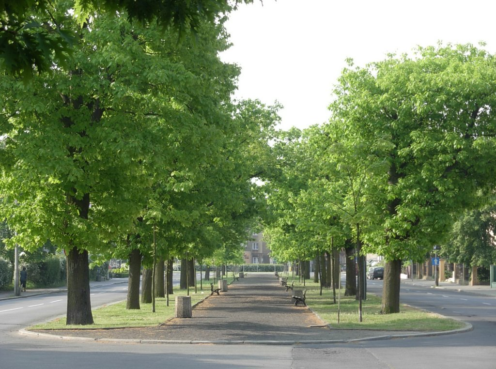 Aleja Ossolińskich w Bydgoszczy